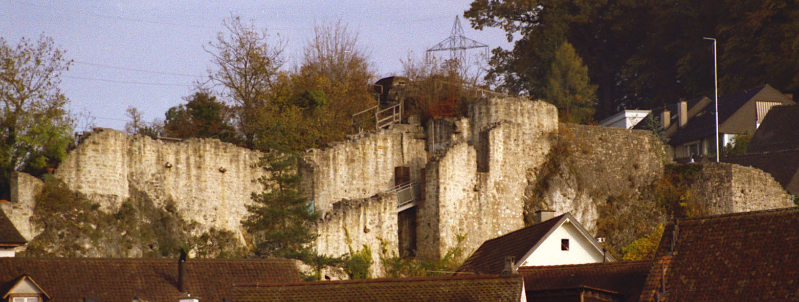 Schloss Münchenstein, Übersicht Kernburg aus Westen